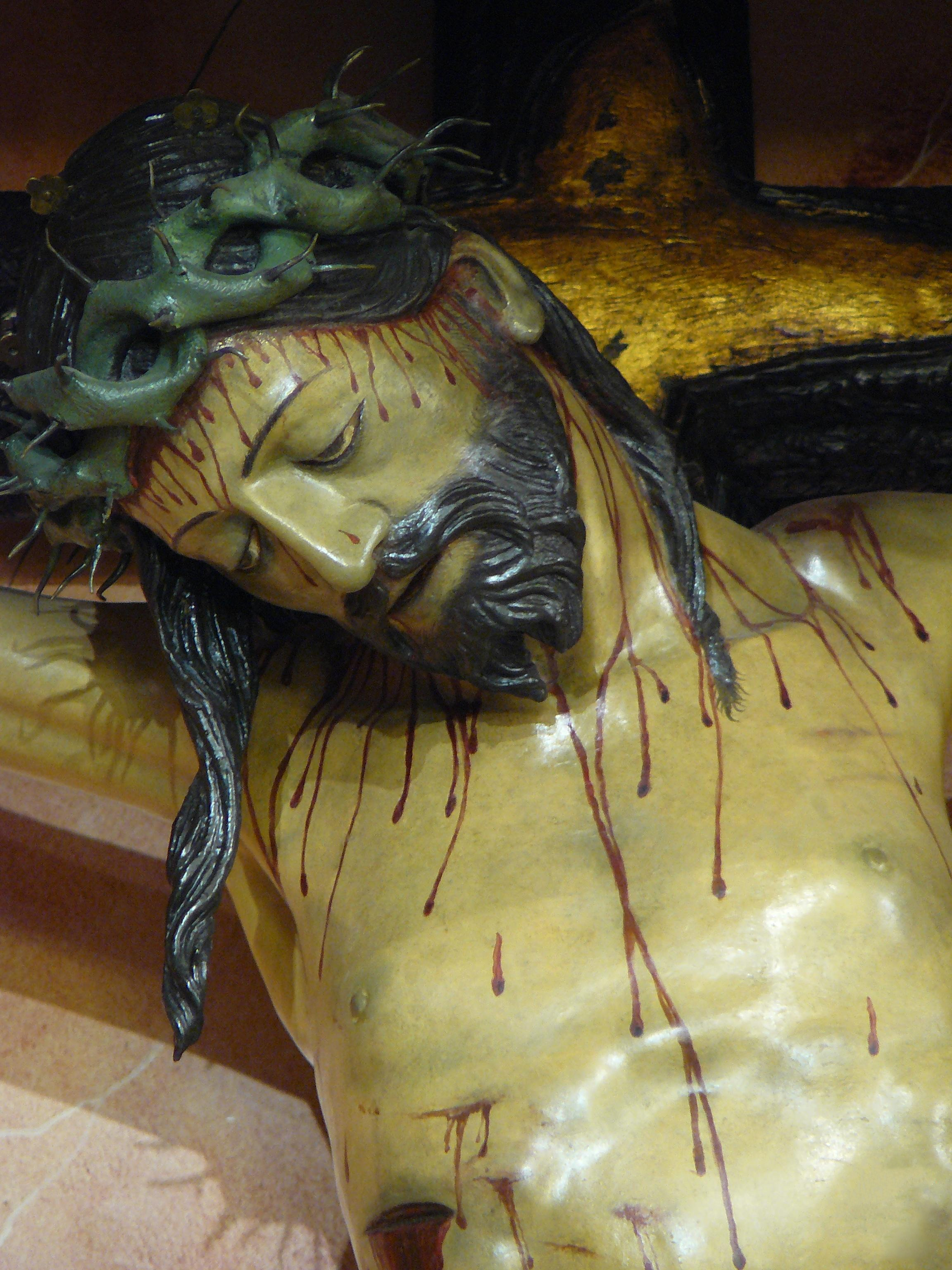 Santísimo Cristo del Perdón de La Puebla del Río (Sevilla). Atribuido a Jorge Fernández Alemán. Siglo XVI.